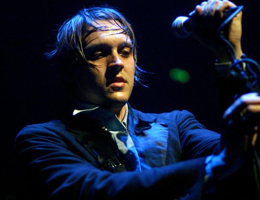 Win Butler 2007.